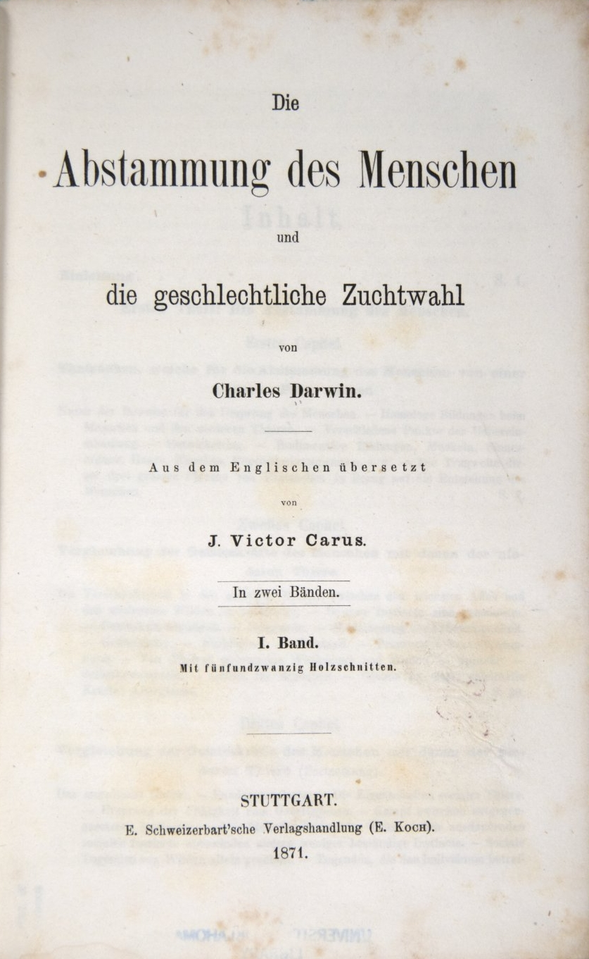 Die Abstammung des Menschen und die geschlechtliche Zuchtwahl. Titlepage Volume 1, first german publication, in Ch. Darwin's gesammelte Werke 2nd edition.